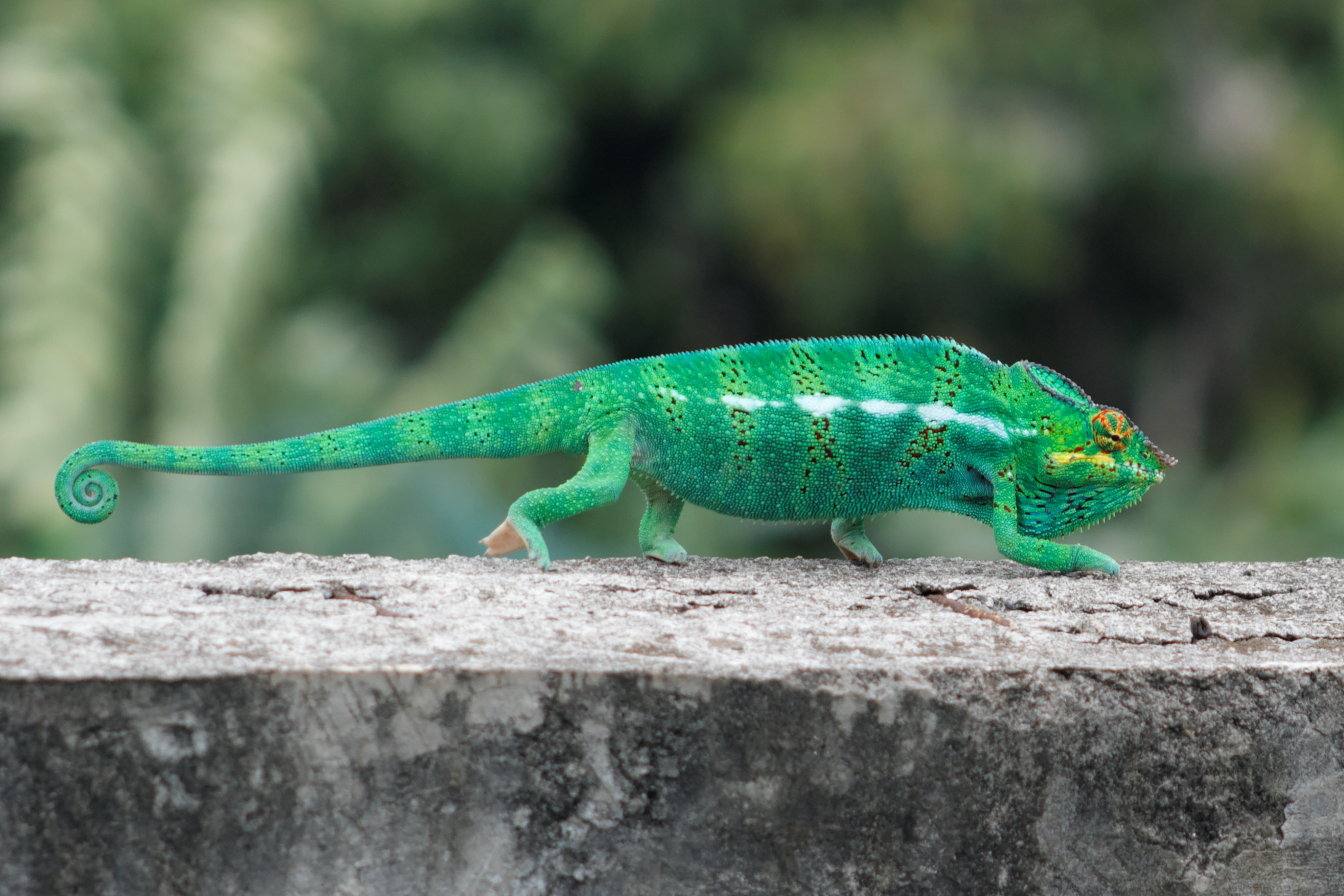 Caméléon panthère mâle à la Réunion